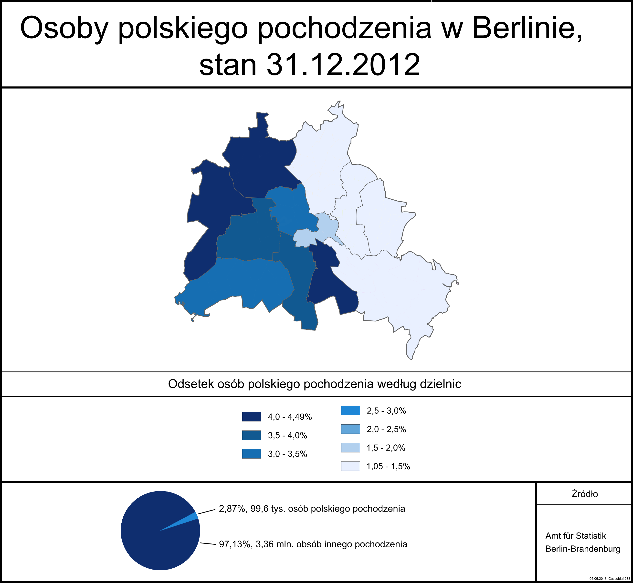 Bevölkerung mit polnischem Migrationshintergrund in BerlinNote: This description has been identified as biased or incorrect: Migrationshintergrund =/= Ethnic origin.